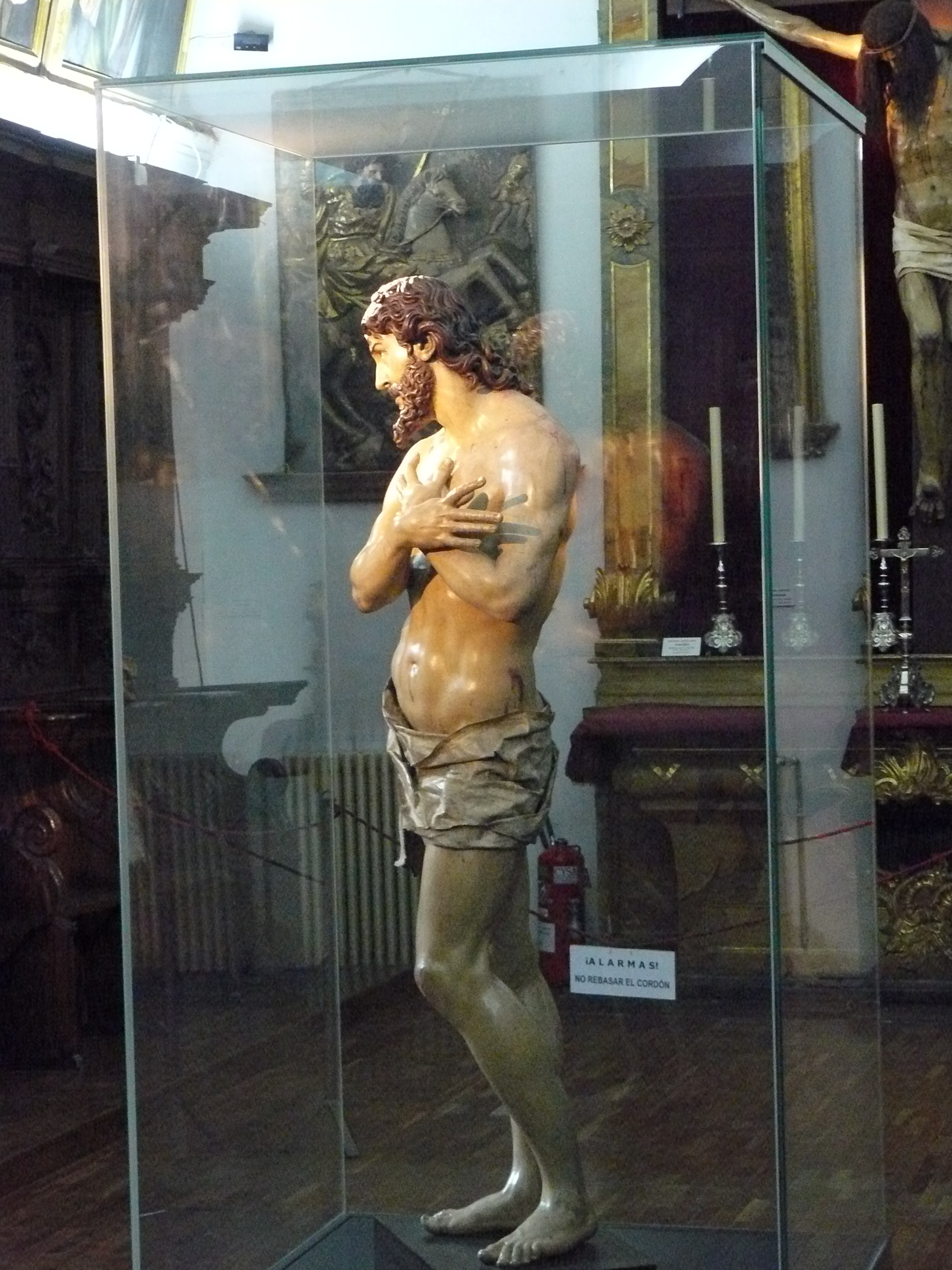 Catedral de Valladolid , Valladolid.